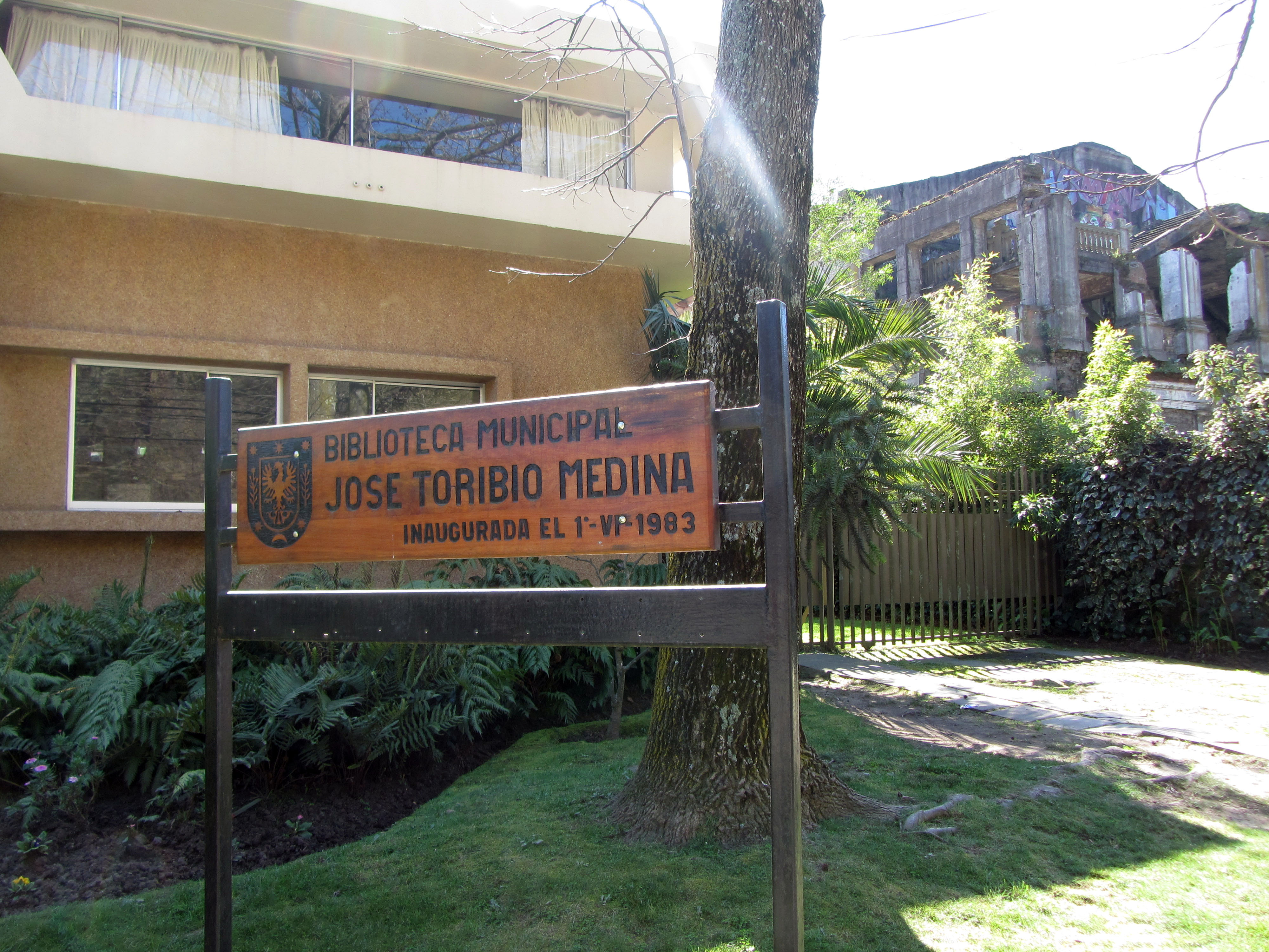 Biblioteca Municipal José Toribio Medina, mejor conocida como Biblioteca Municipal de Concepción Concepción, Chile Septiembre de 2012